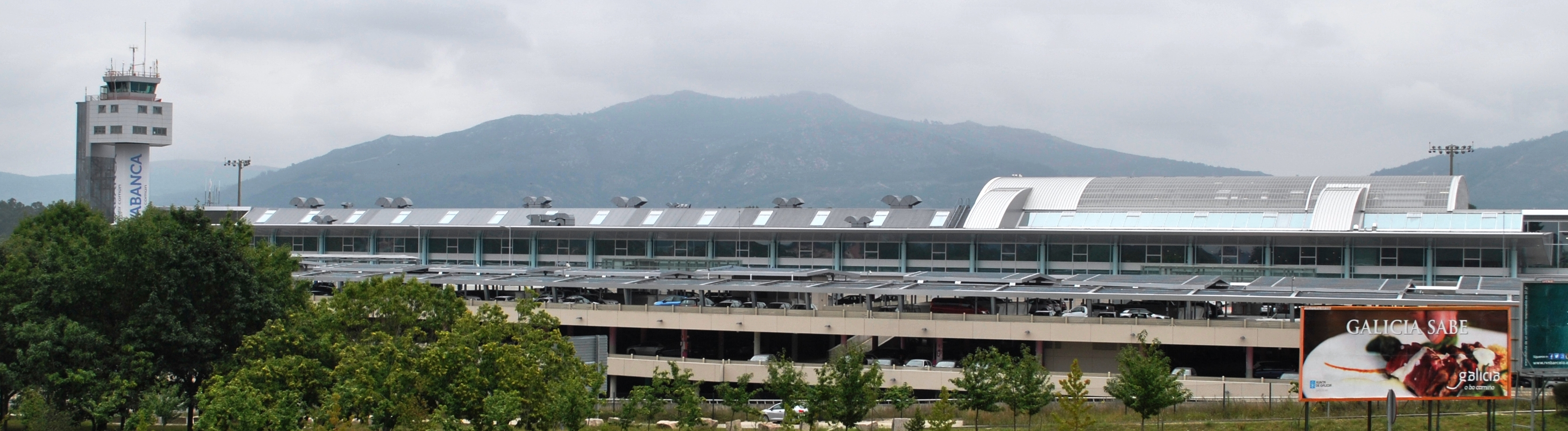 Véxase o título e as categorías.